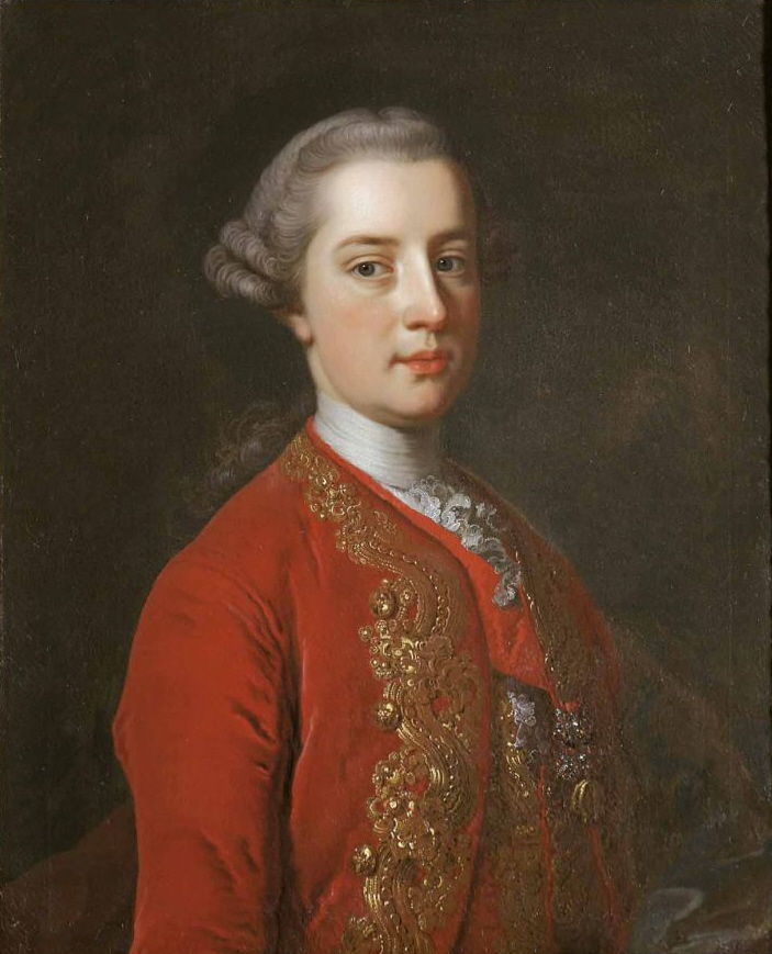 Erzherzog Joseph